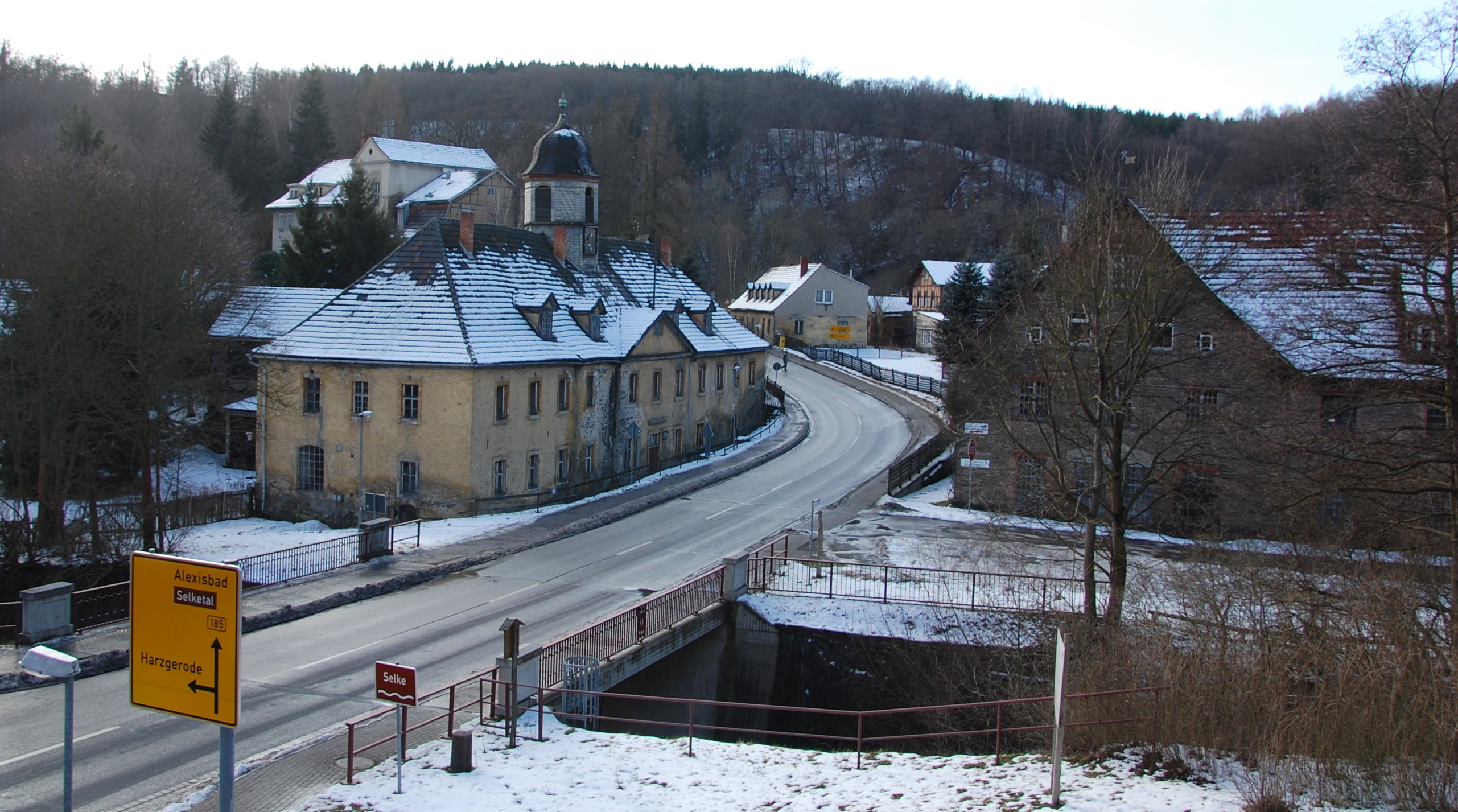 Mägdesprung Blick auf Selkebrücke und Teile des Hüttenwerkes